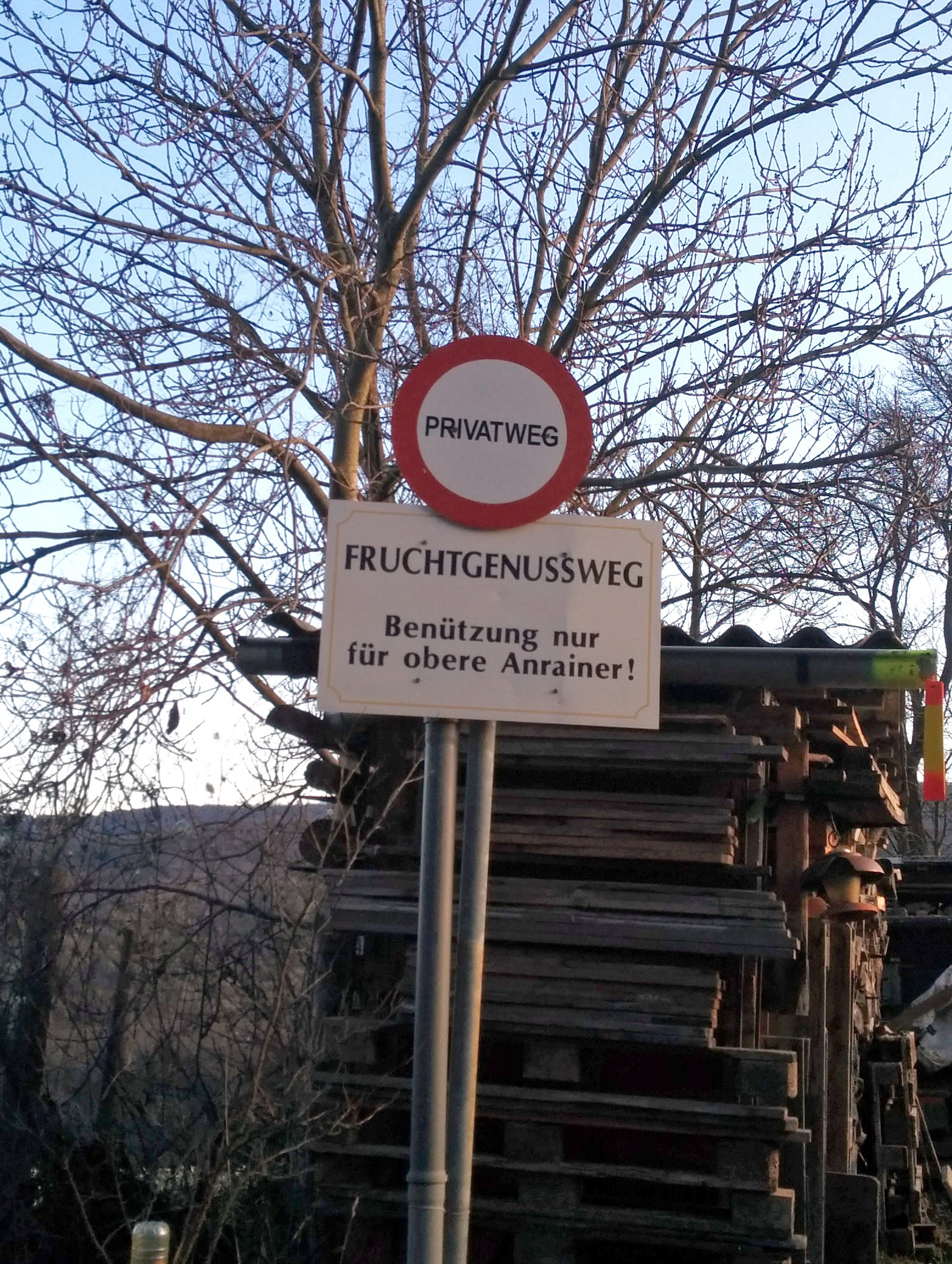 Kennzeichnung eines Fruchtgenussweges (Nießbrauchrecht)